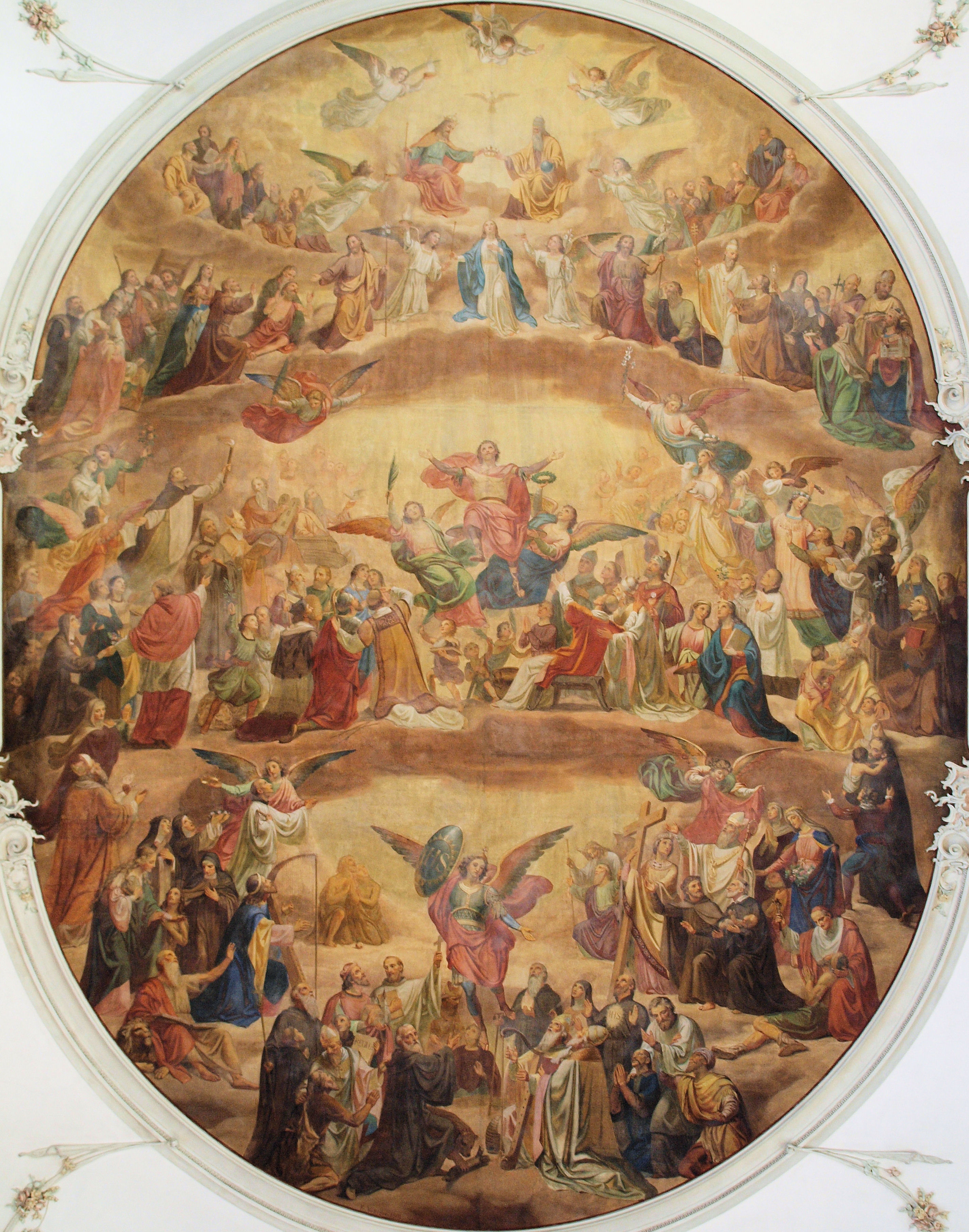 Das mittlere Denkengemälde in der Pfarrkirche St. Mauritius in Appenzell. Das Gemälde stammt von Franz Vettinger aus Uznach, und wurden zwischen 1890 und 1892 gemahlt. Es vereint verschiedene Bildgedanken, Allerheiligen, Mariä Krönung und Glorie des Kirchenpatron Mauritius